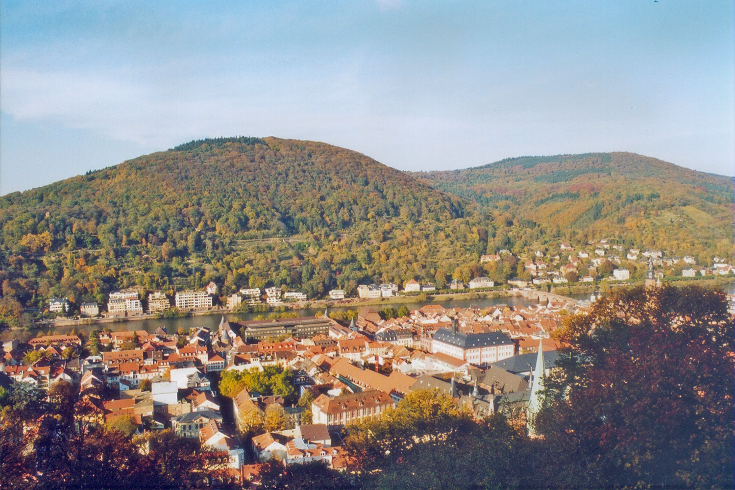 Blick auf Heidelberger Altstadt und Heiligenberg von der Riesensteinkanzel